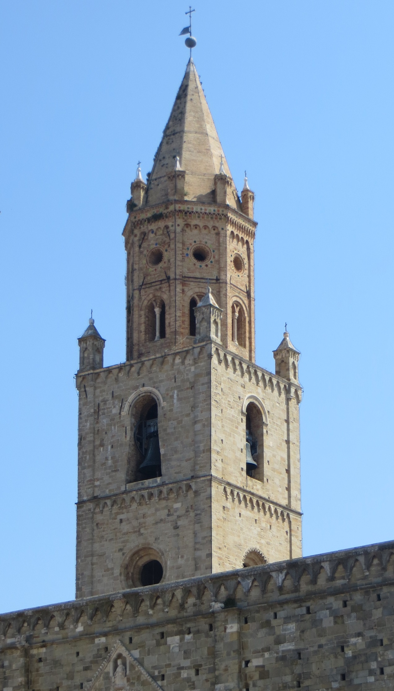 Campanile del Duomo di Atri